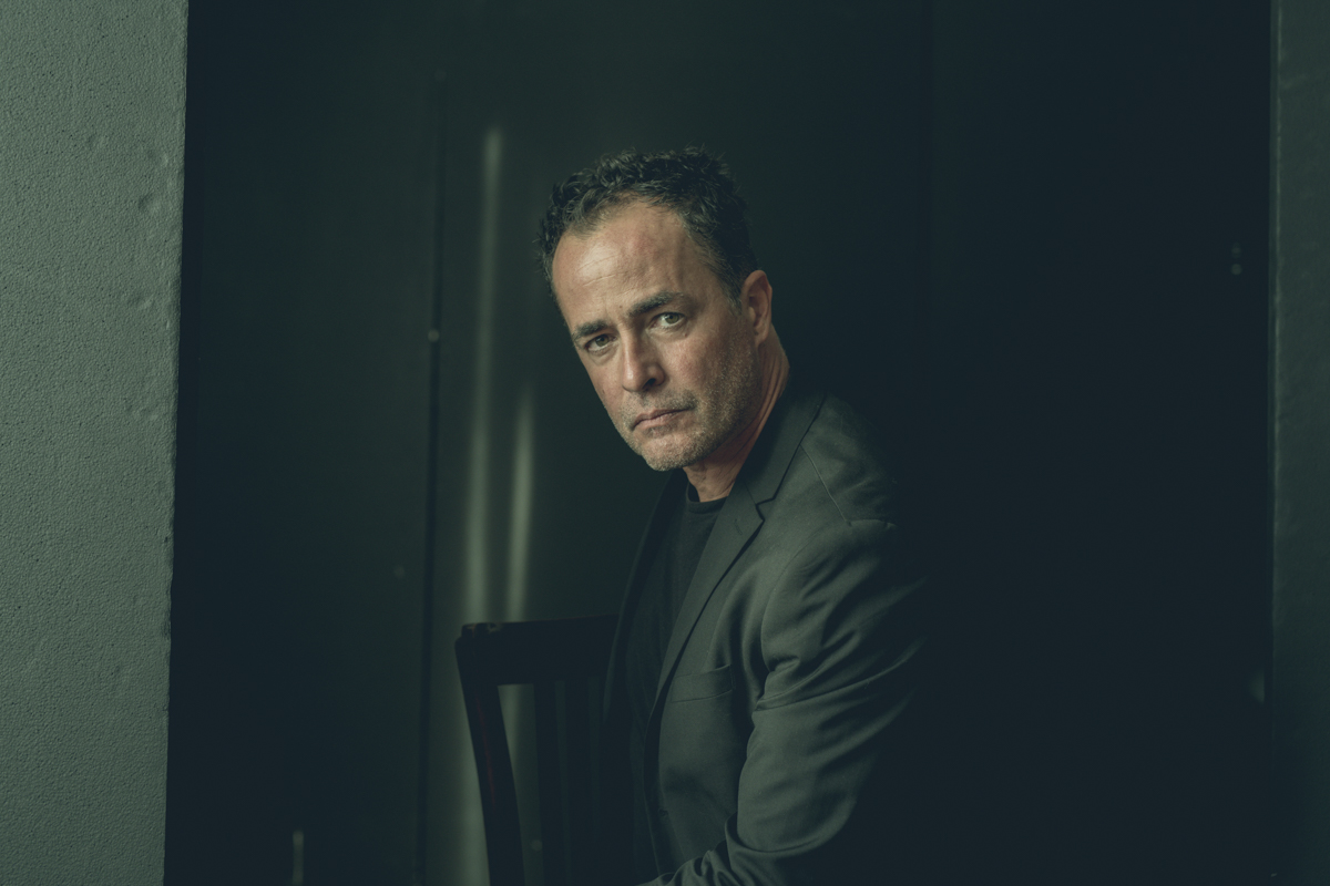 Giovanni Guidelli Attore italiano